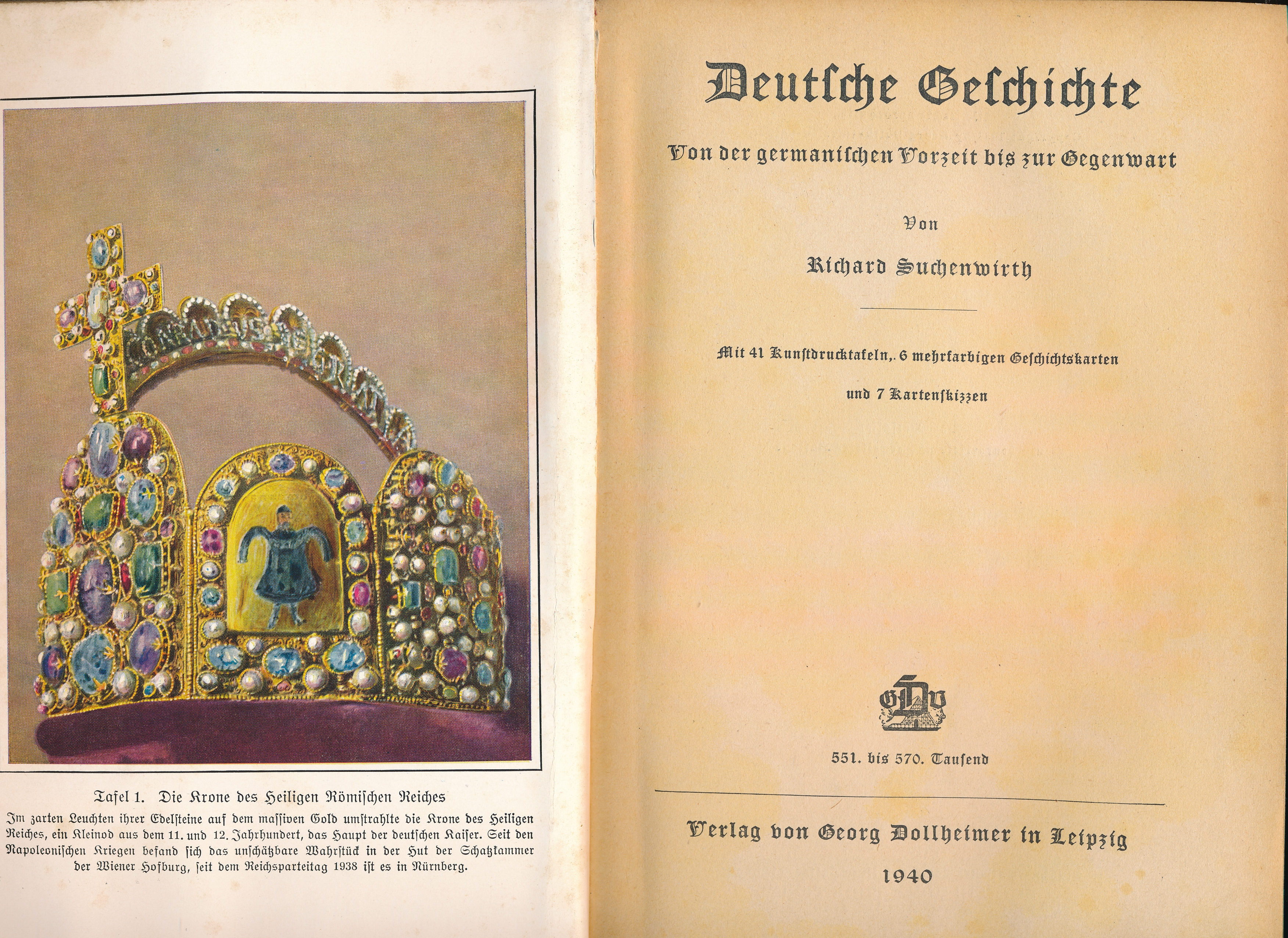 Richard Suchenwirth: Deutsche Geschichte, Ausgabe 1940